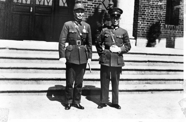 蔣介石與龍雲合照，1941年